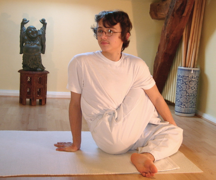 Yoga postures Ardha-matsyendrasana